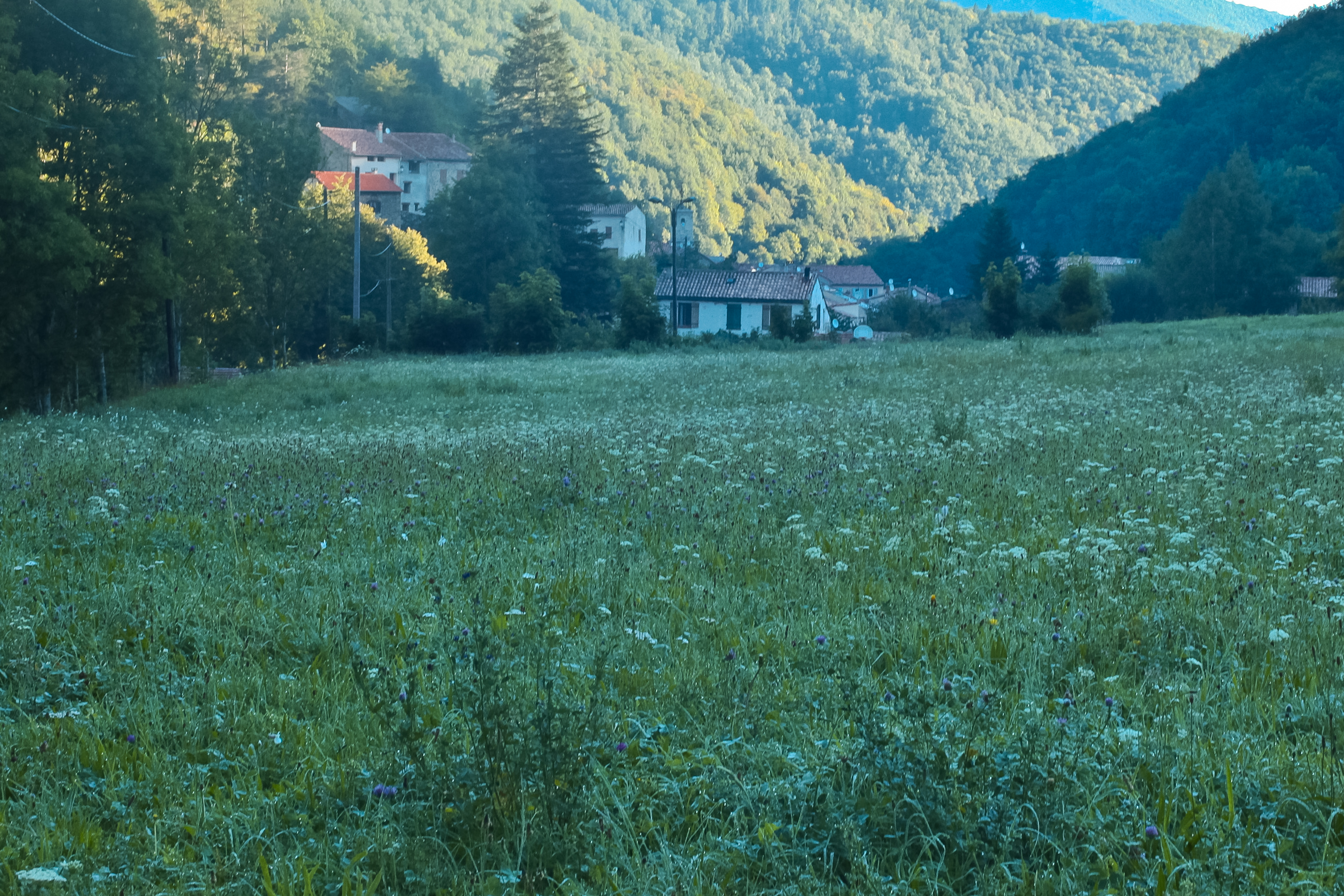 Vue générale du village de Montfort-sur-Boulzane (Aude)